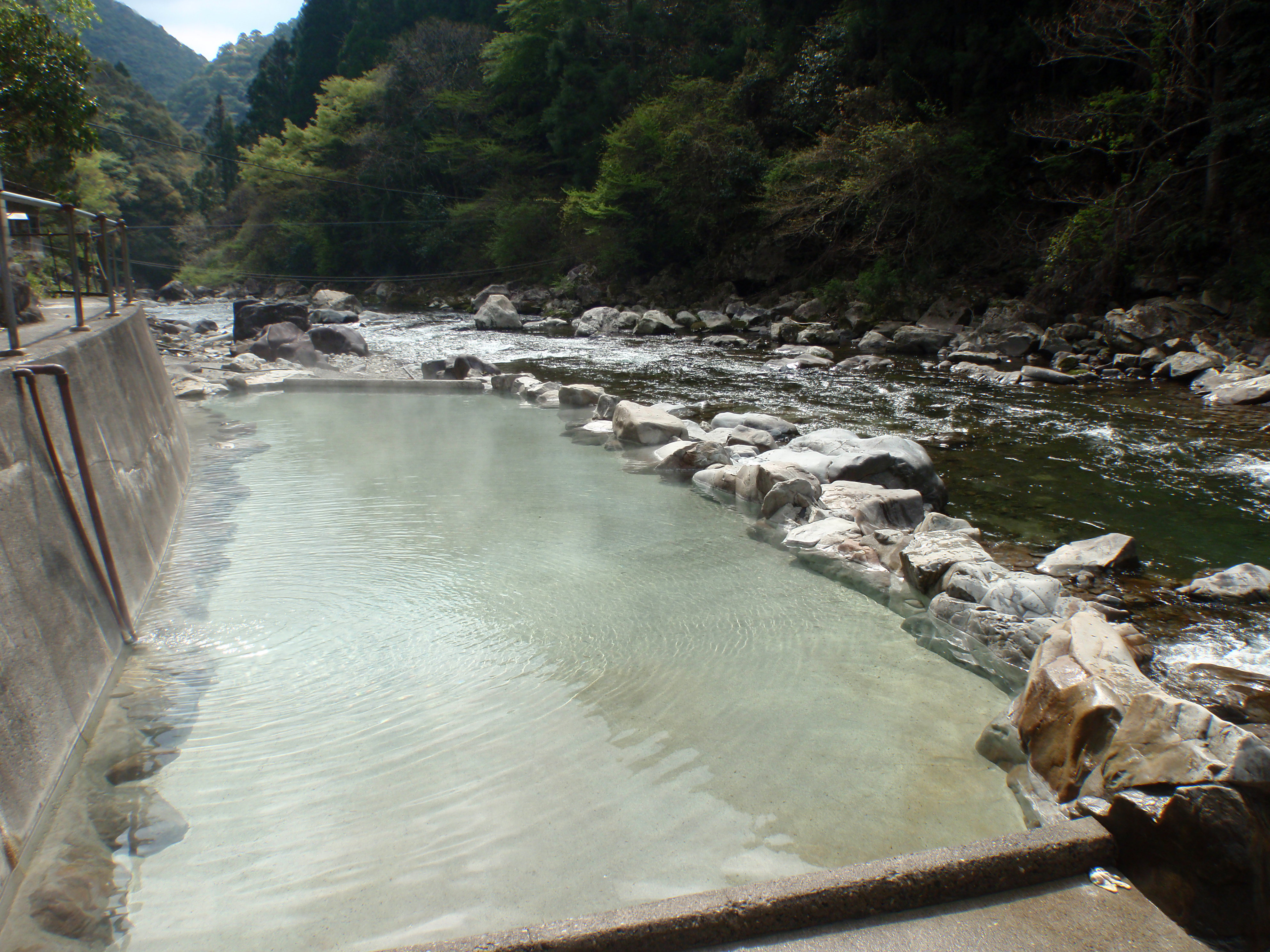 上湯温泉、神湯荘が管理する川の露天風呂。